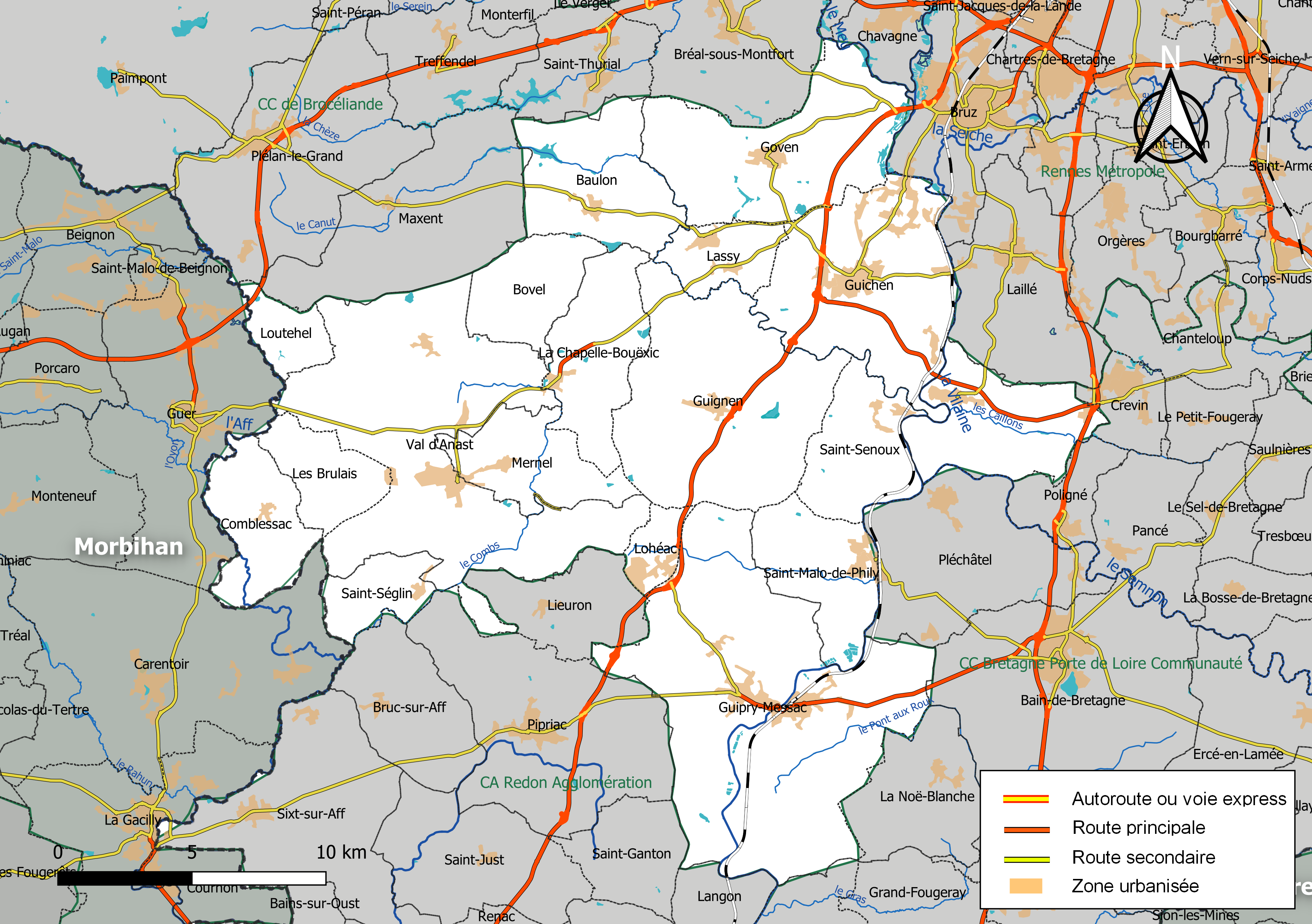 Carte géographique de la Communauté de communes Vallons de Haute-Bretagne Communauté, département d'Ille-et-Vilaine, France. Composition au 1er janvier 2019.